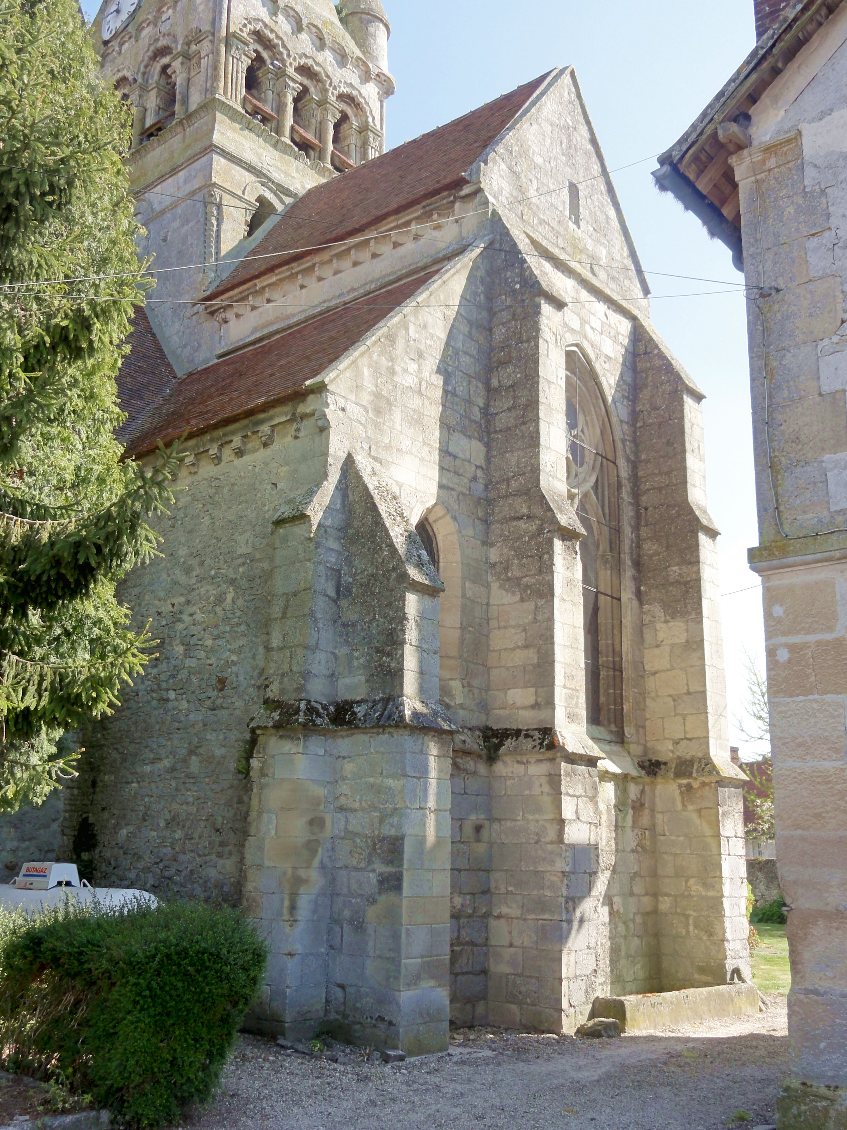 Chapelle et croisillon sud, vue depuis le sud-ouest.